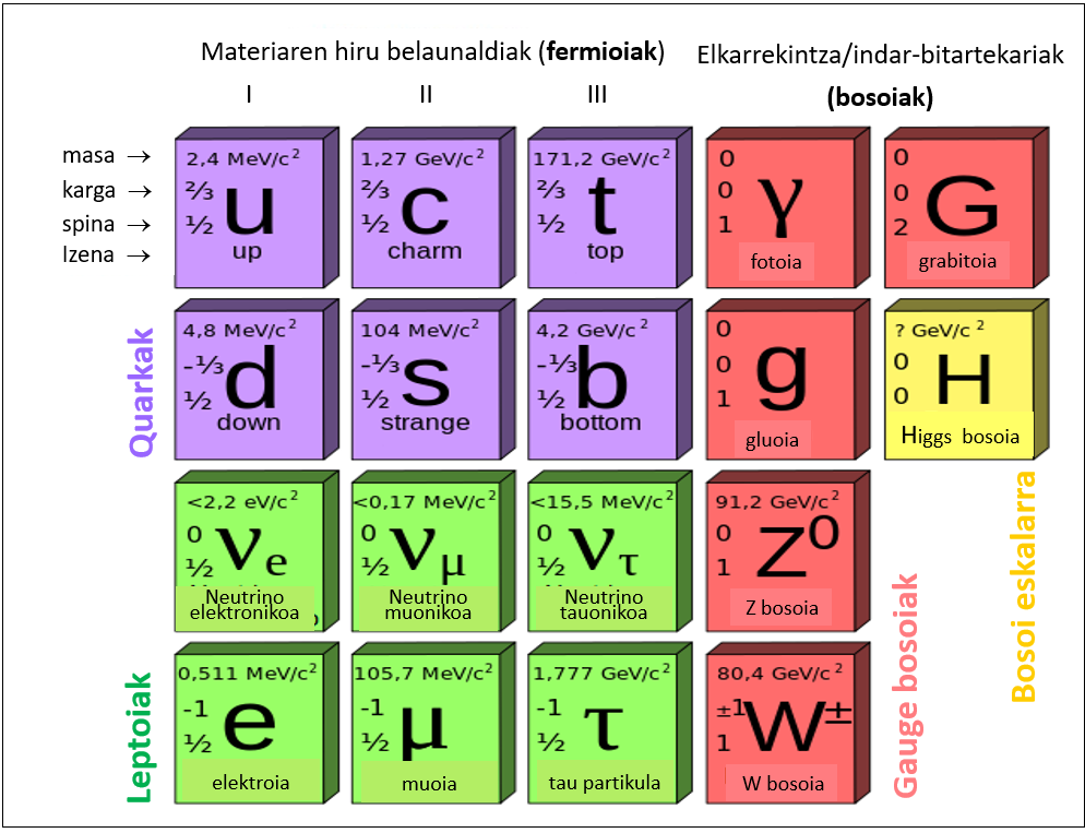 Oinarrizko elkarrekintzetan parte hartzen duten oinarrizko partikulen sailkapen eskematikoa.